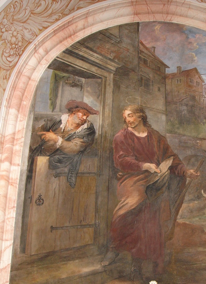 Gemäldeausschnitt aus dem Zyklus der Sieben Schmerzen des Hl. Joseph aus einer Seitenkapelle in der St.-Josephs-Kirche in Grüssau